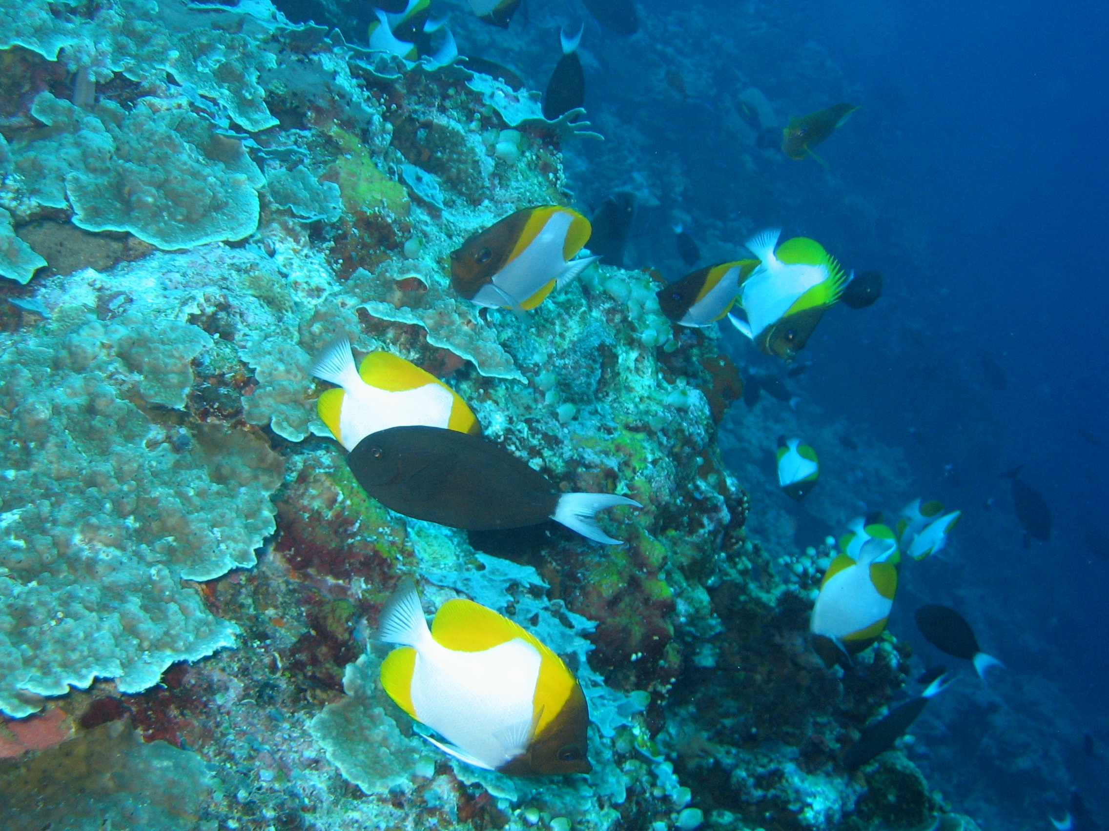 Hemitaurichthys polylepis, Apo reef, Filipinas